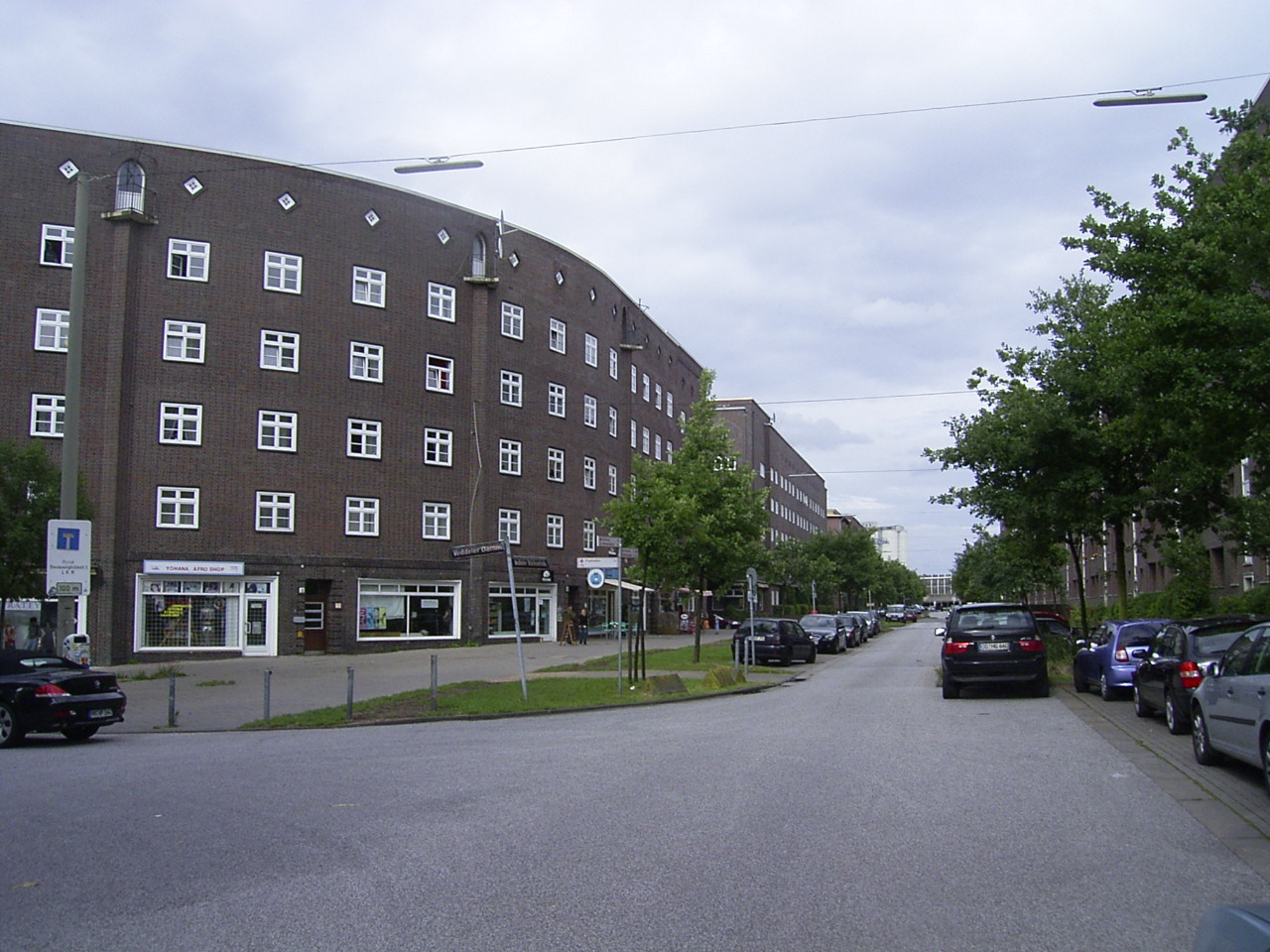 Der Wohnblock an der Veddeler Brückenstraße auf der Veddel wurde 1926/27 von Elingius & Schramm unter Mitarbeit von Hermann Höger errichtet.